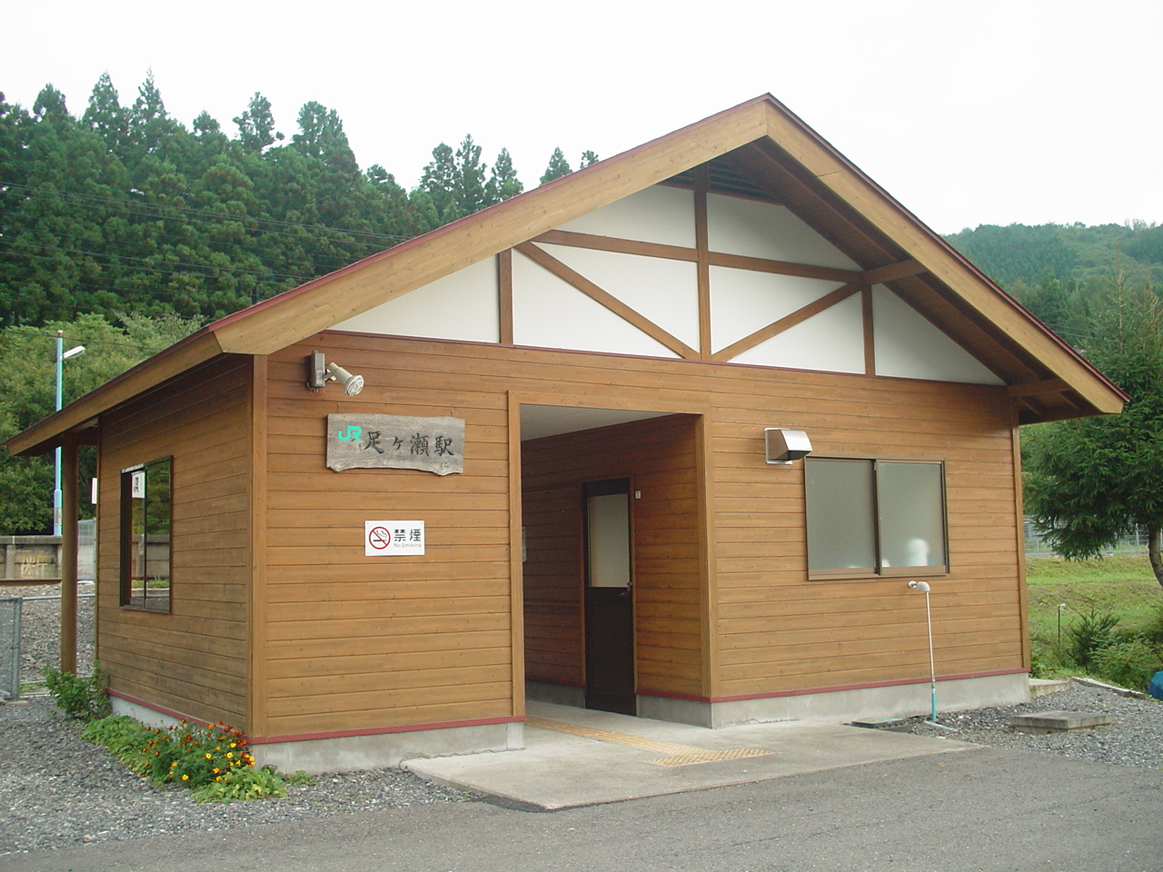 （足ヶ瀬駅）